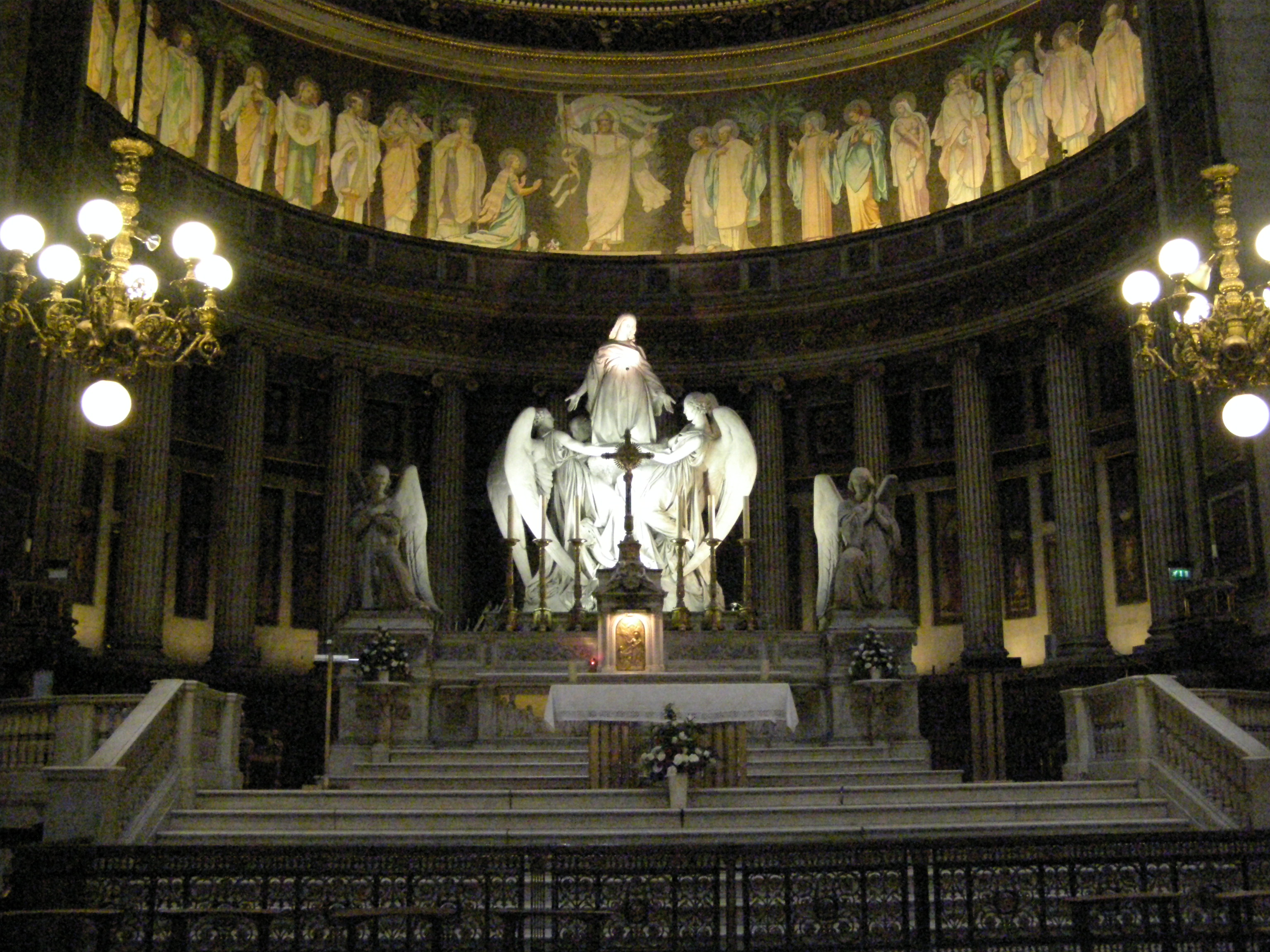 Église de la Madeleine